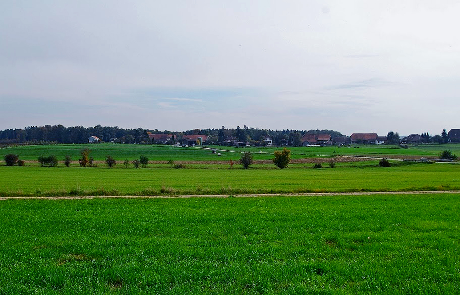 Ansicht des Dorfes Hersiwil aus der Distanz